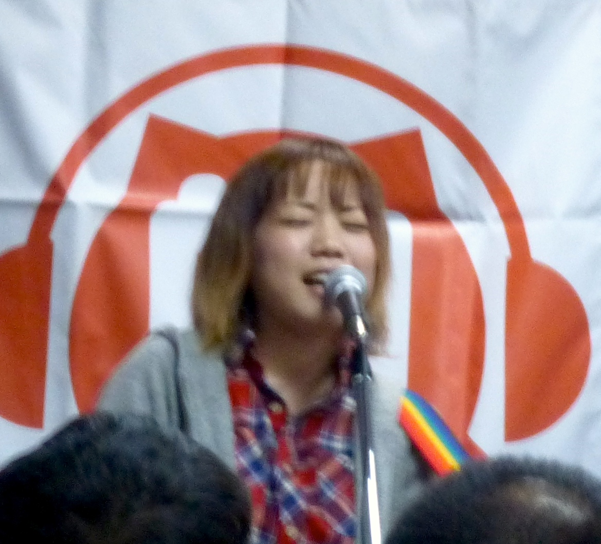 的野 祥子（まとの しょうこ、1991年2月26日 - ）は、福岡県福岡市出身のシンガーソングライター (Shoko Matono is a singer-songwriter from Fukuoka, Japan)